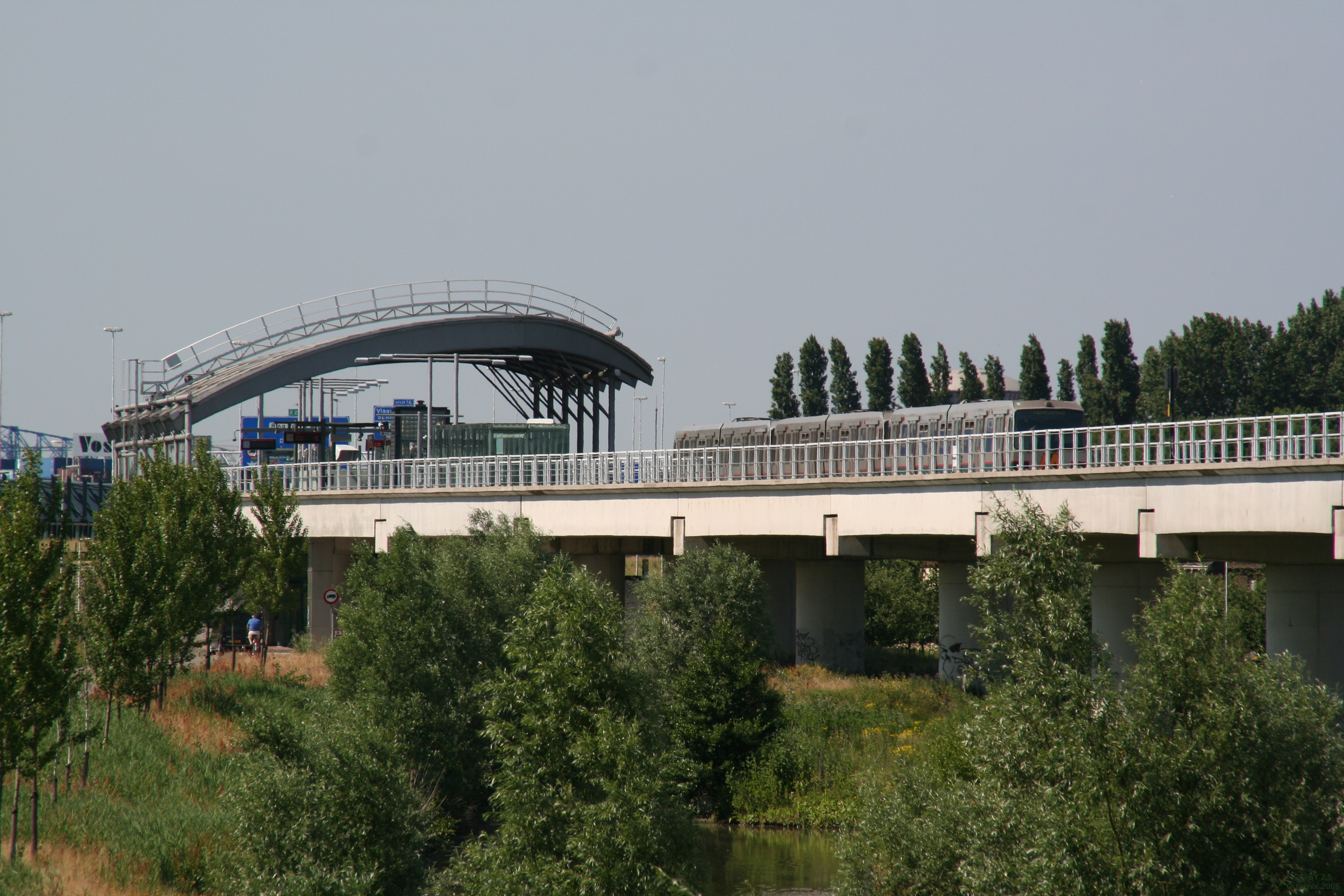 Metrostation Pernis